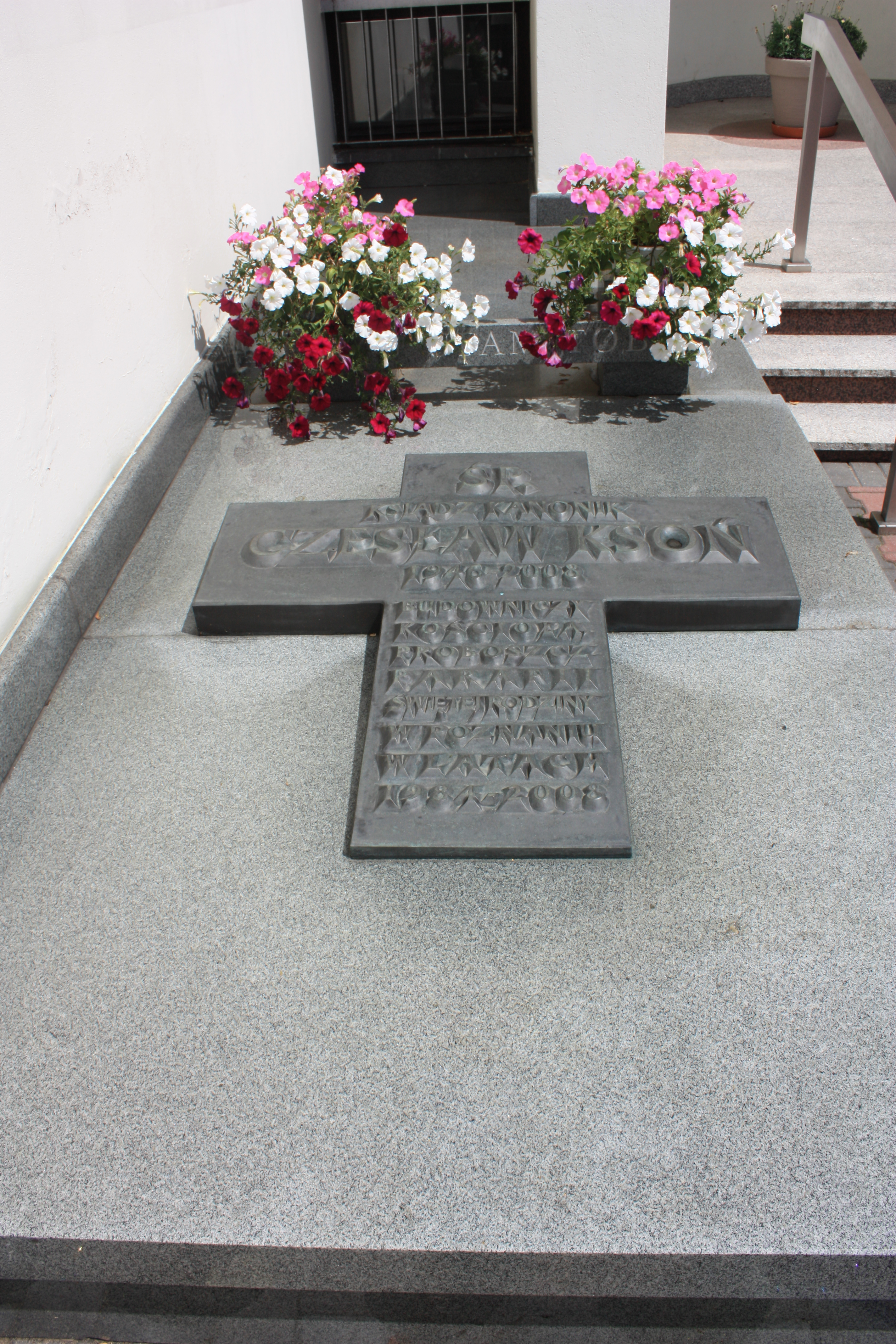 Grób ks. kan. Czesława Ksonia przy kościele Świętej Rodziny w Poznaniu.